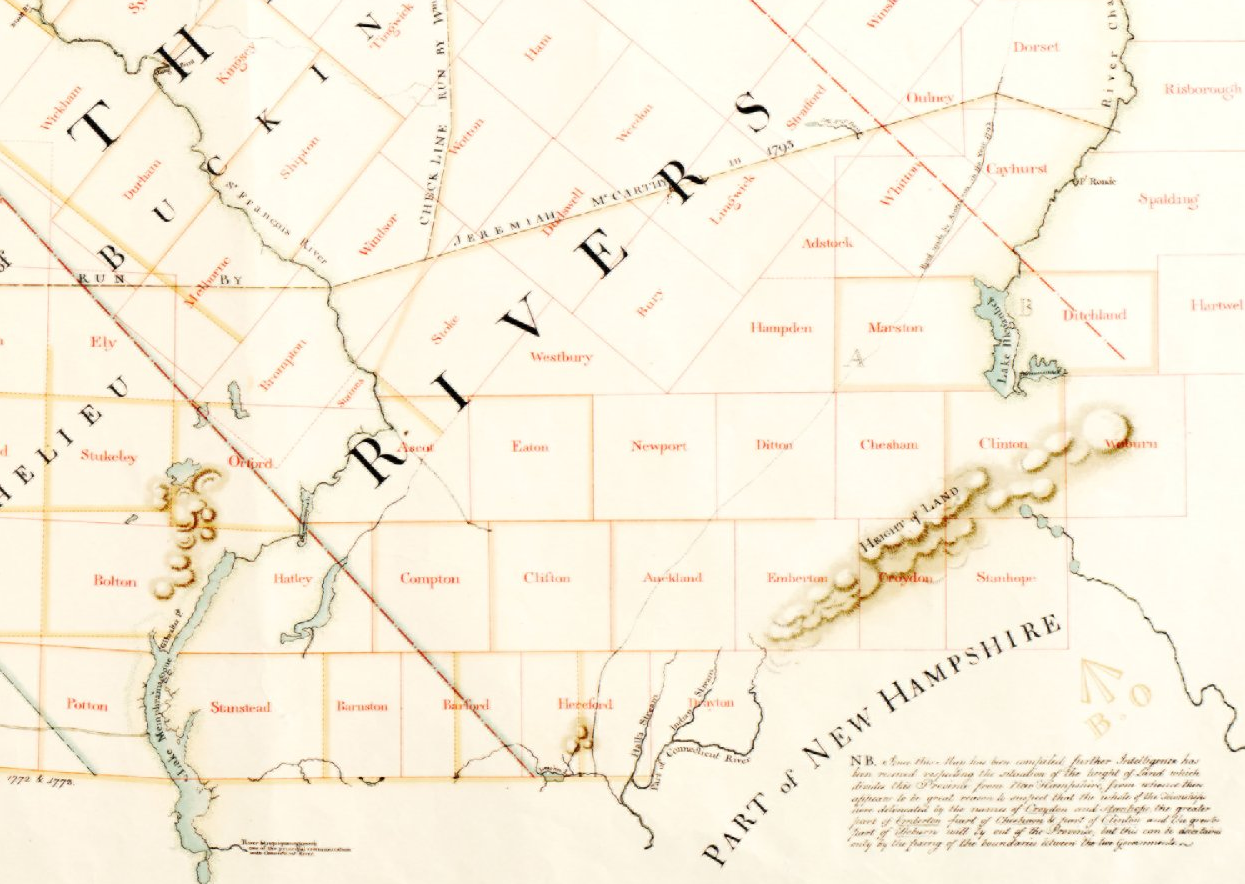 Carte de Gale et Duberger - info